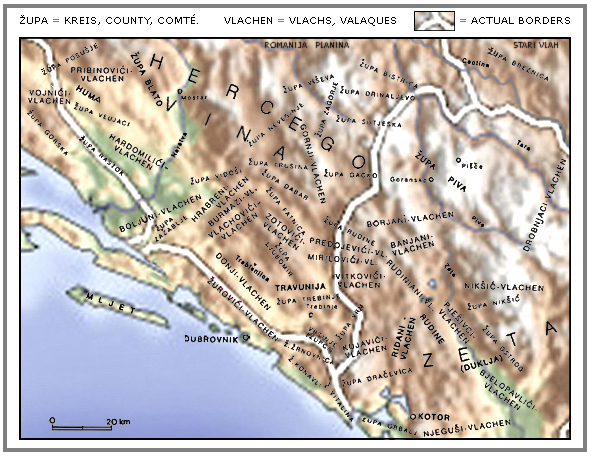 Communautés valaques médiévales de l'Herzégovine et de la Zéta